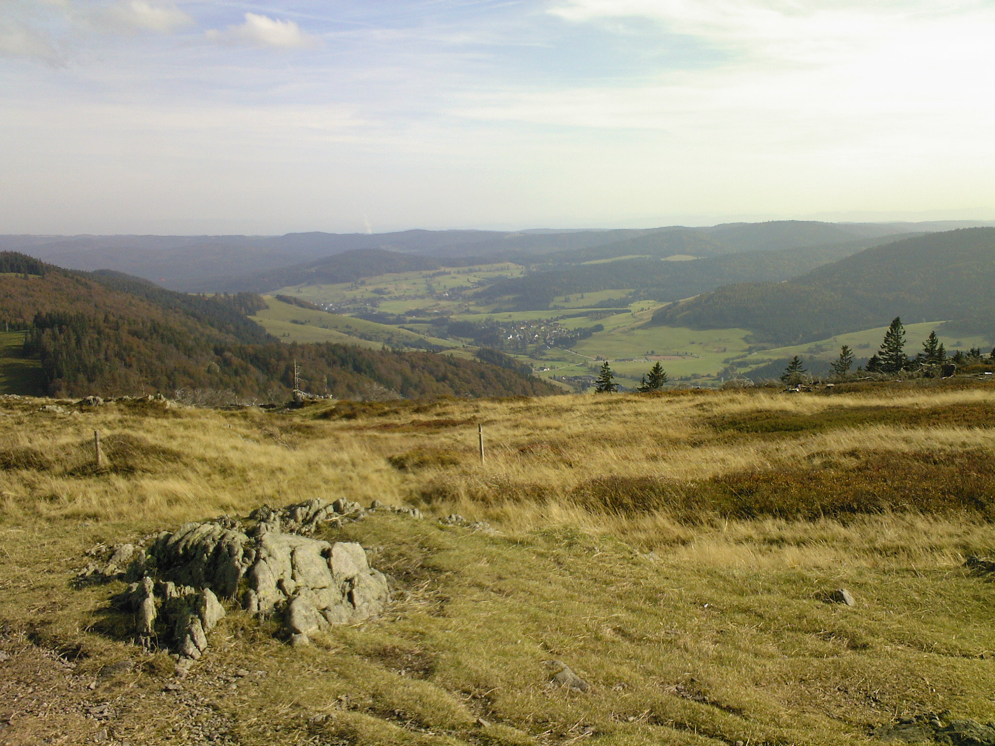 Blick vom Herzogenhorn in Richtung Bernau. Am Horizont sieht man den Dampfpilz vom Kernkraftwerk Leibstadt